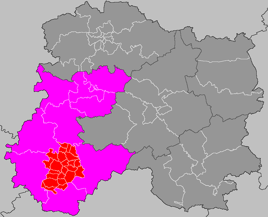 Localisation du canton de Sézanne